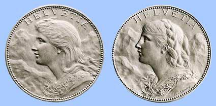 Vreneli sketch 1895 / Vreneli Entwurf von 1895